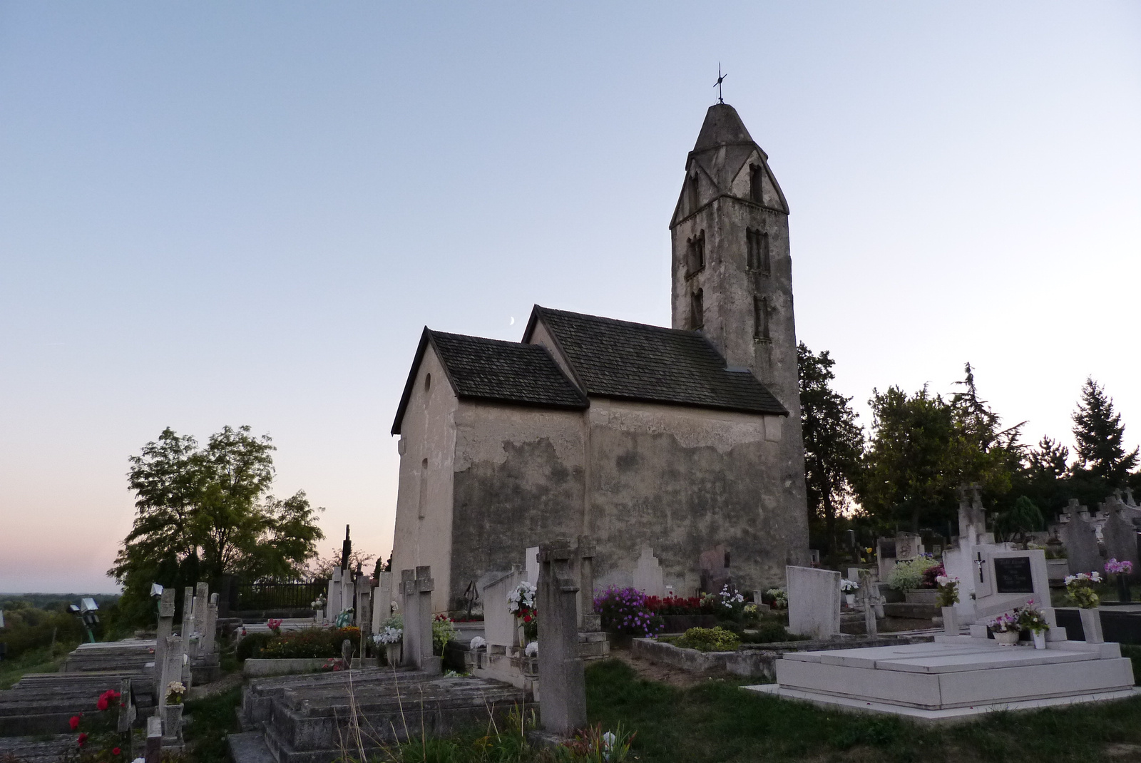 Kisboldogasszony római katolikus templom (Hévíz, EGREGY, Dombföldi u., temető) This is a photo of a monument in Hungary, Identifier: 10833